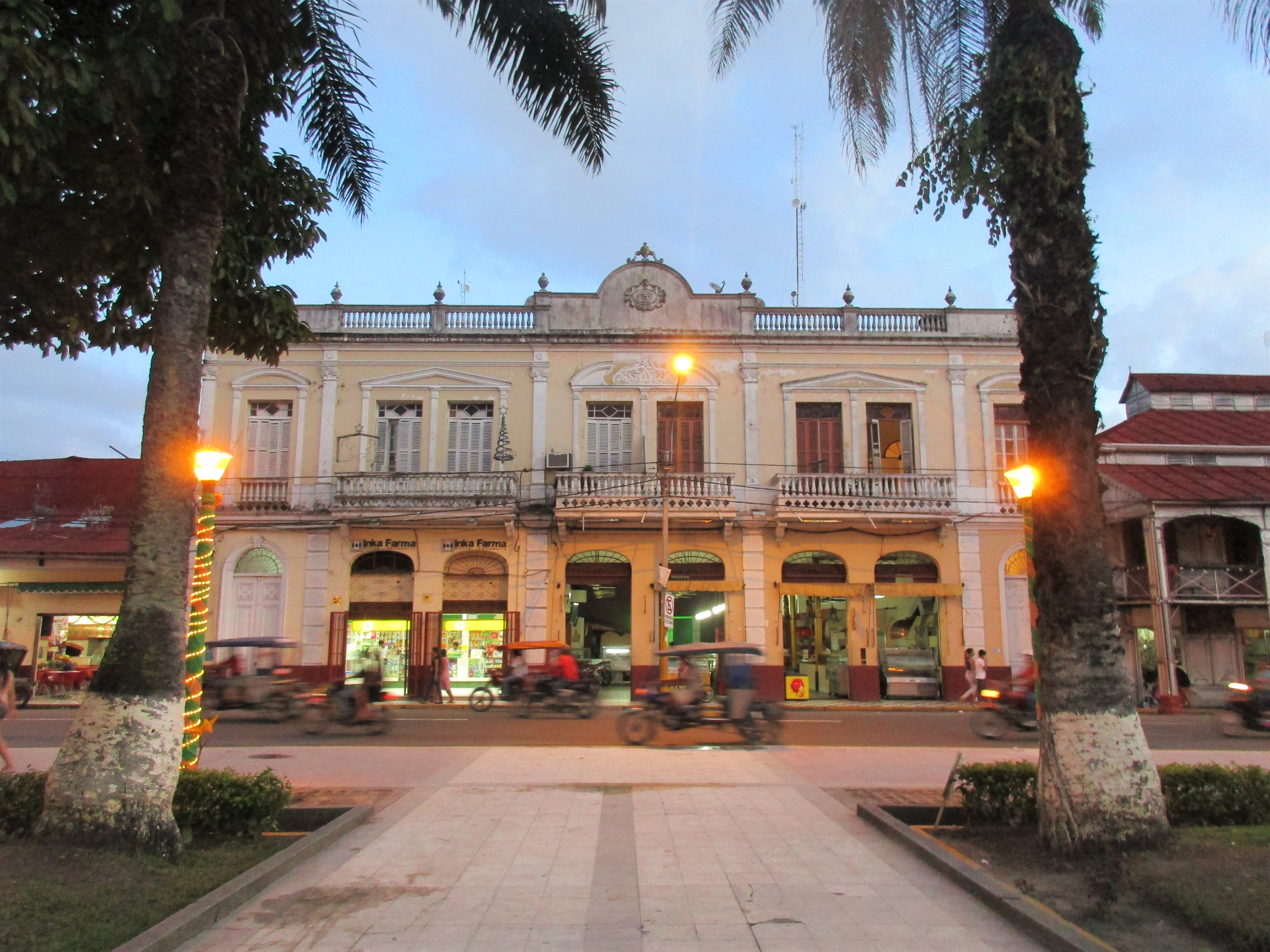 La Casa Pinasco en el centro historico de la ciudad de Iquitos, Perú.